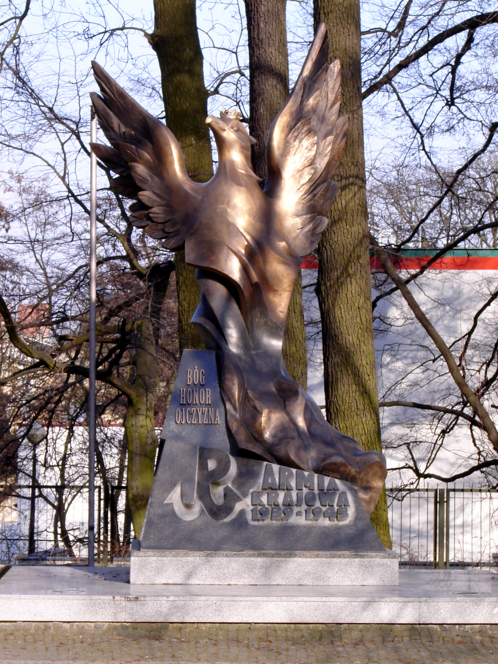 Pomnik AK w Sopocie, park sanitariuszki Inki